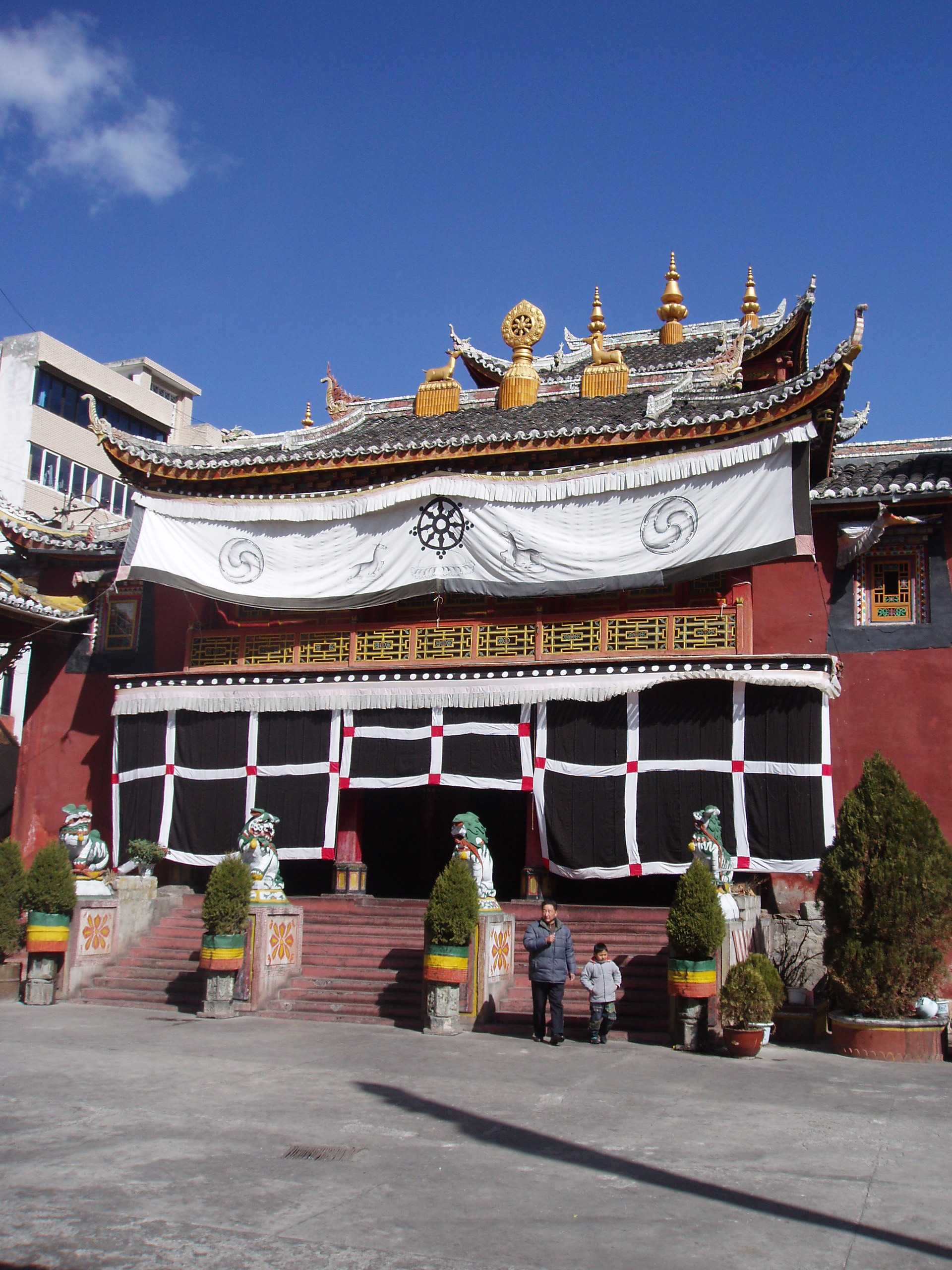 Via principale di Kangding - Tempio di Anjue